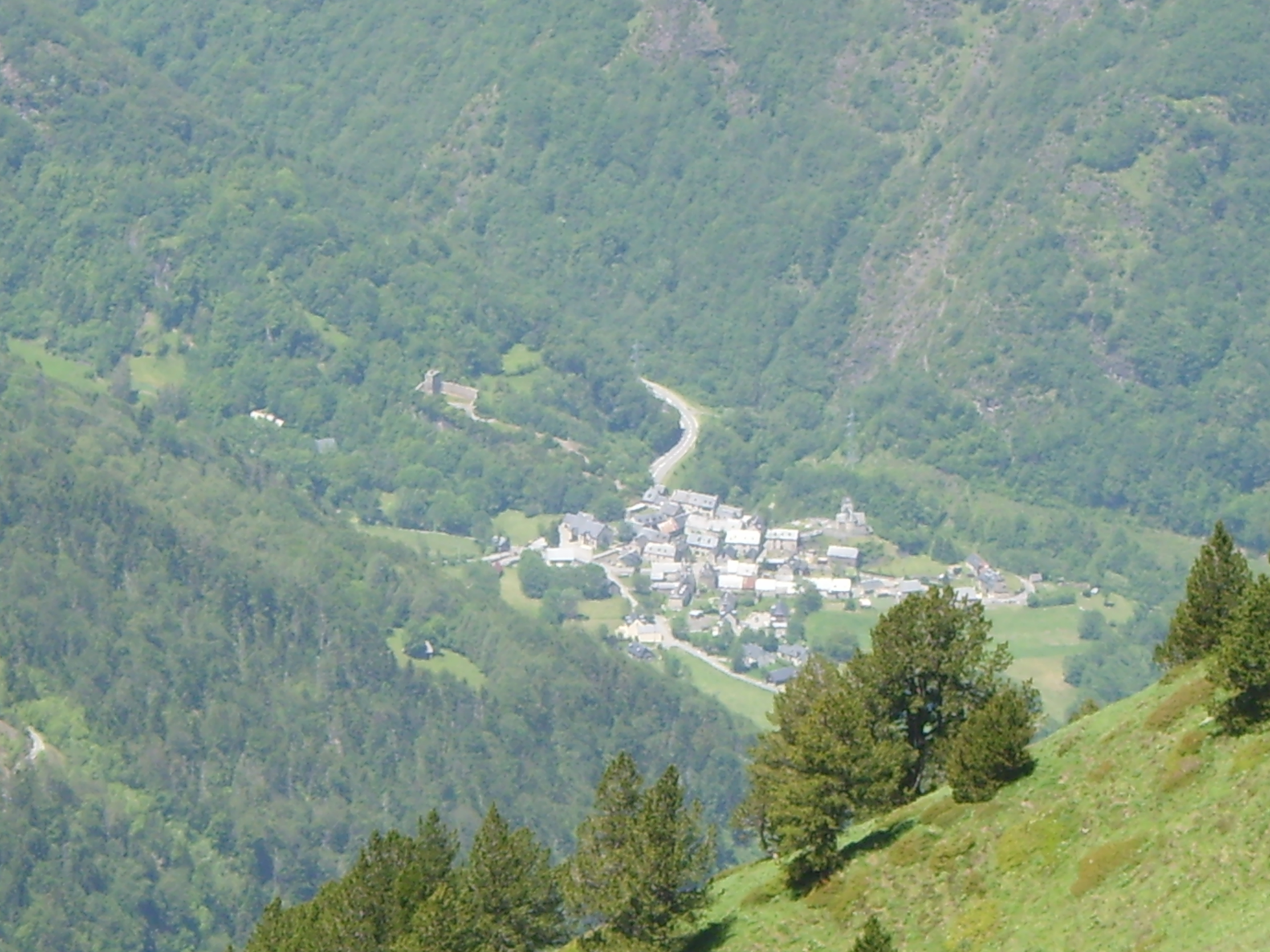 Le village de Tramezaygues depuis le cap de Laubère (2200 mètres)